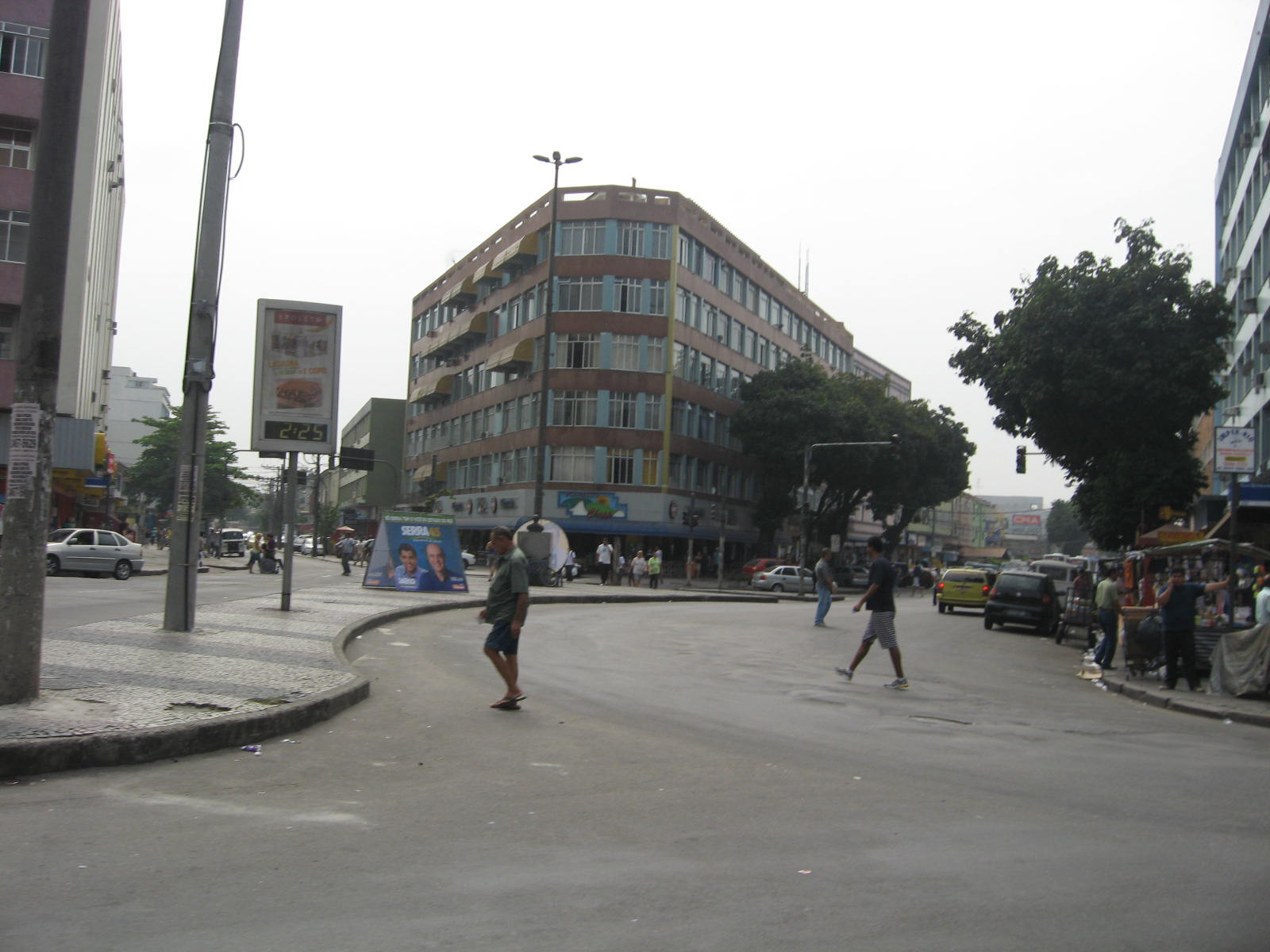 Vista de Bonsucesso, bairro do subúrbio do Rio de Janeiro.